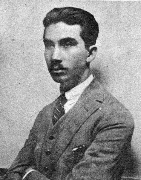 Jorge Vinatea Reynoso (1900 - 1931), pintor peruano, representante del Indigenismo independiente.